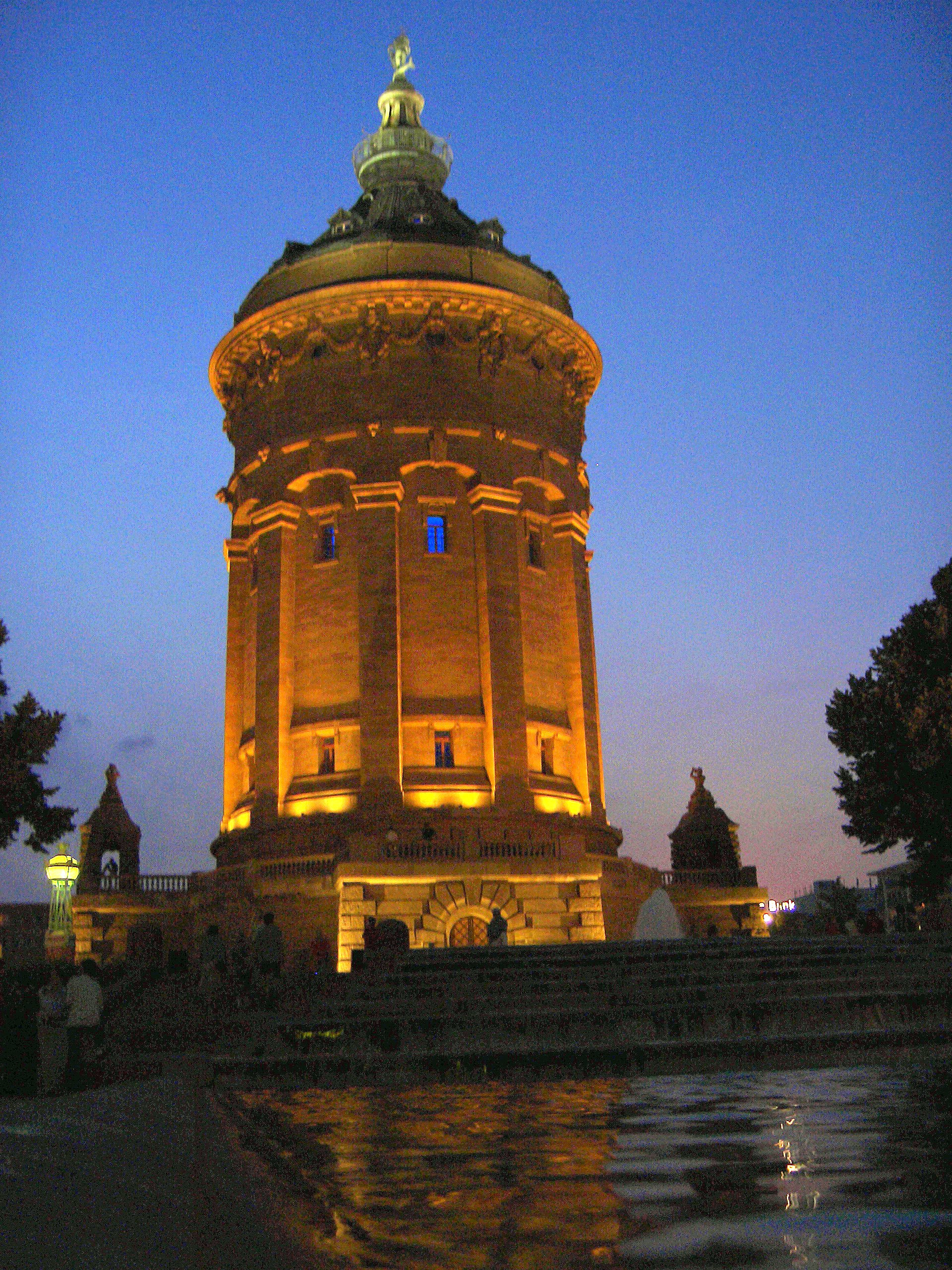 Der Mannheimer Wasserturm in der Abenddämmerung